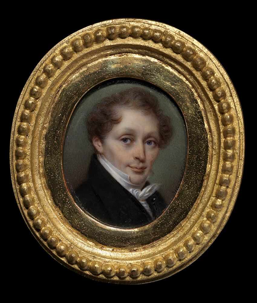 Portret van Franciscus Josephus Kinsoen (Jean Baptiste van Acker, circa 1825 - circa 1830); collection: Musea Brugge - Groeningemuseum